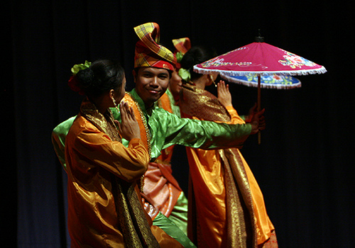 Persembahan Joget Melayu oleh kumpulan kebudayaan UNISEL.